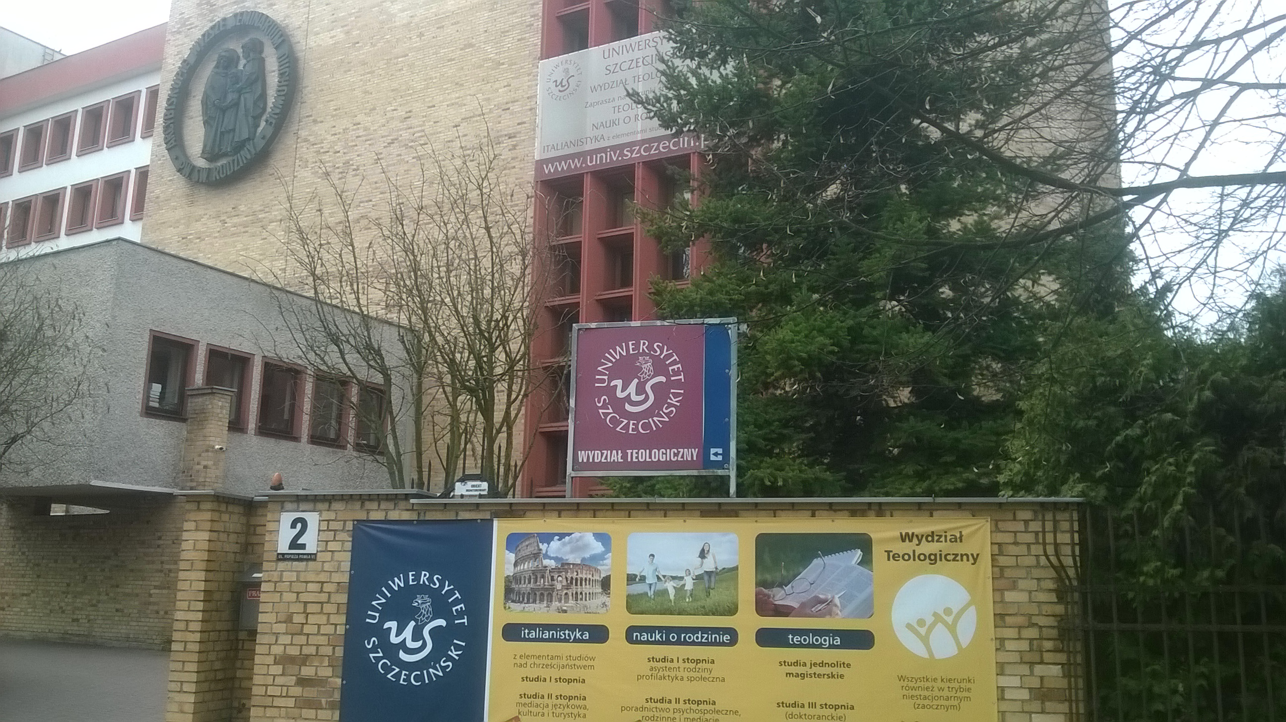 Wydział Teologiczny Uniwersytetu Szczecińskiego przy ul. Papieża Pawła VI nr 2 - brama wjazdowa